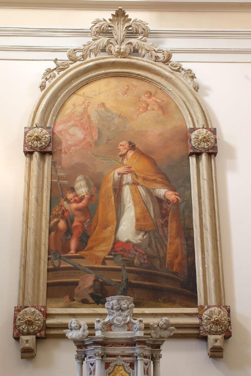 Misure cm 210.0x150.0 (HxL) Datazione secolo XVIII (1740) Autore Novelli Pietro Antonio, ambito veneto Materia e tecnica olio su tela La tela raffigura San Clemente inginocchiato su un alto basamento formato da tre gradini, con alla base il suo attributo principale: l¿ancora. Il santo è rappresentato con un camice bianco con sovrapposto il piviale color ocra, insieme alla stola inserita nel cingolo stretto in vita. Alla sua destra si accosta un putto che gli porge la tiara papale. Nella parte superiore la Trinità attorniata da putti.